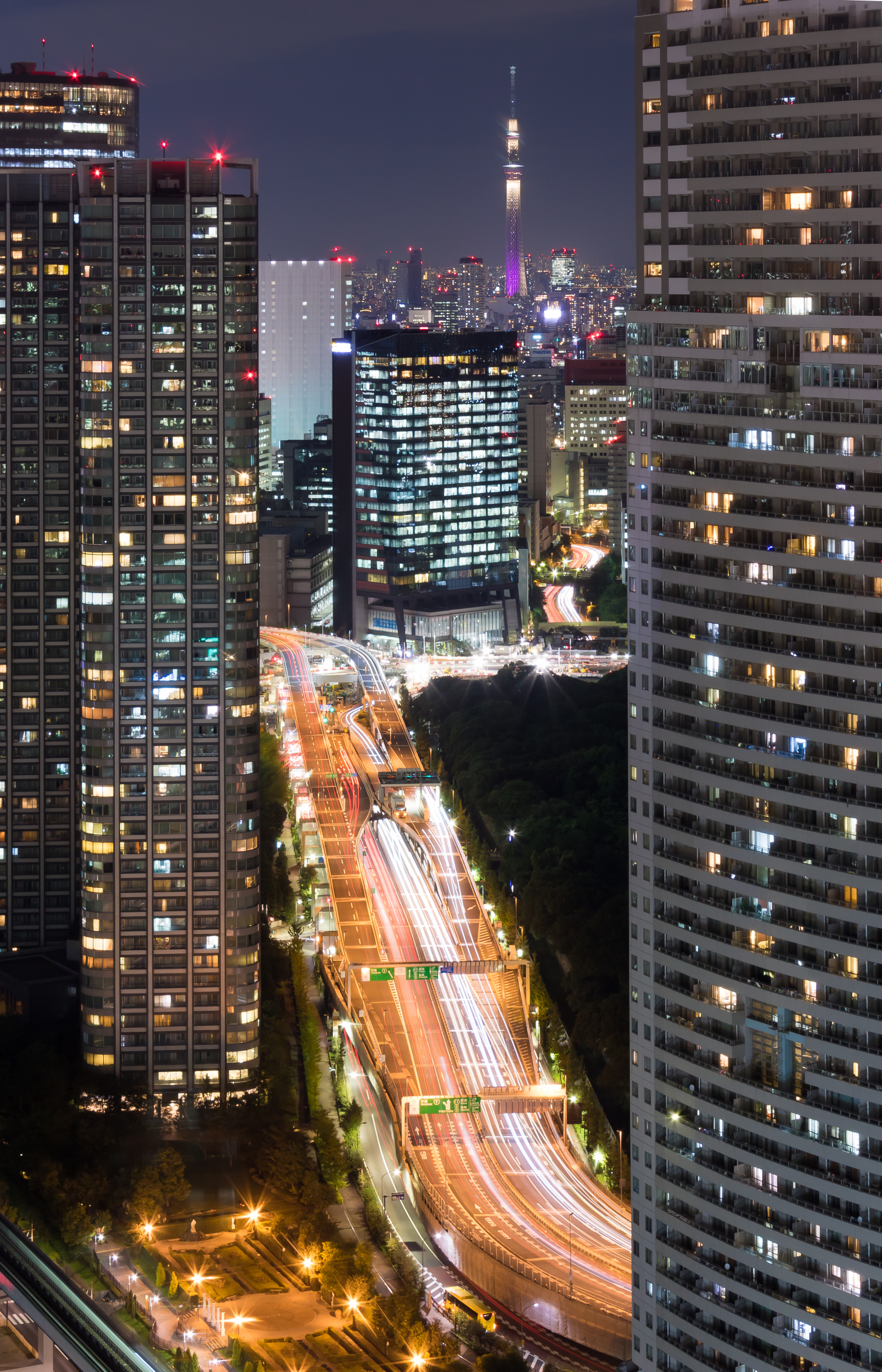 首都高環状線、スカイツリー。世界貿易センタービルからの夜景。